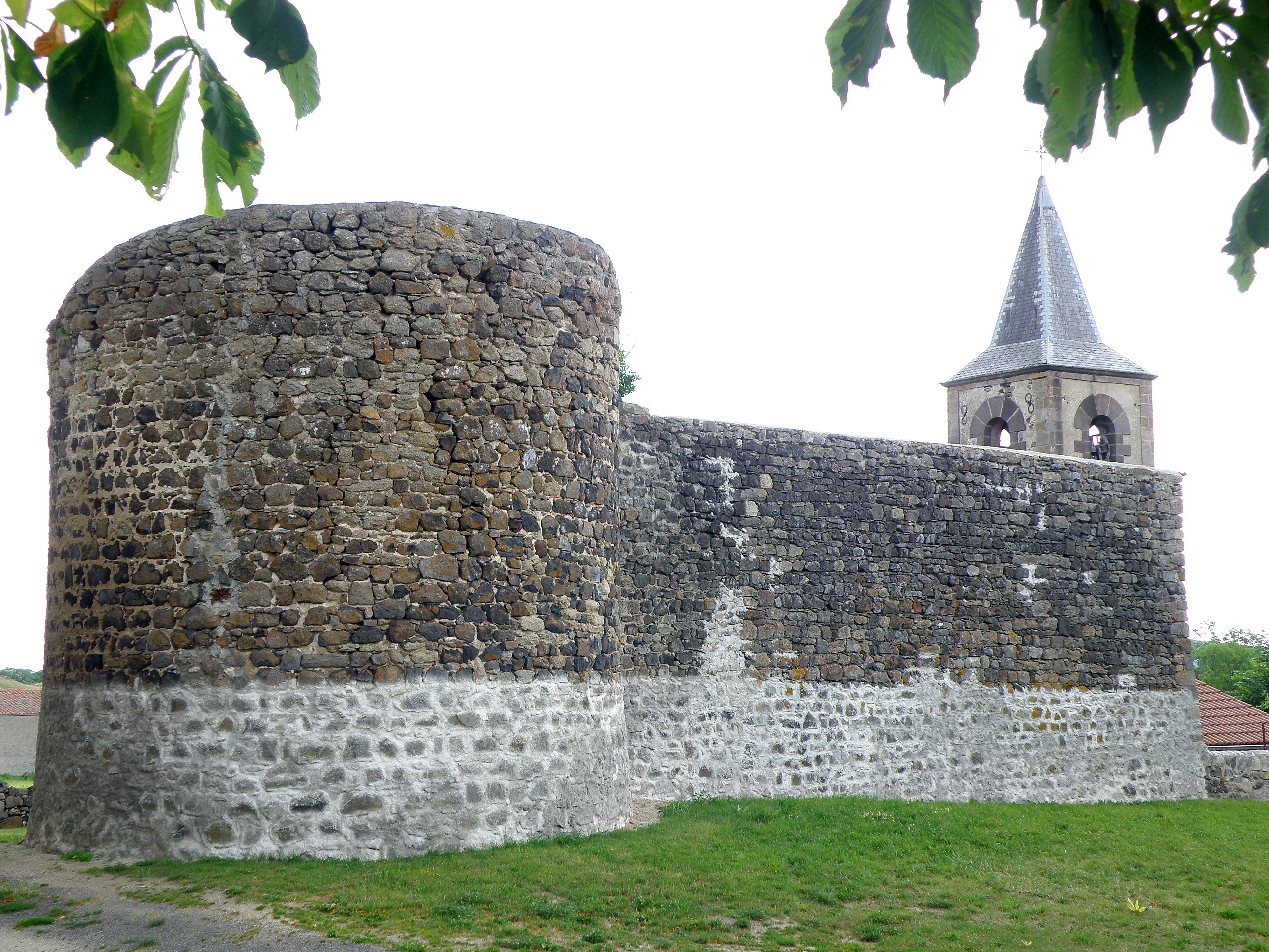 Olloix, comm. du Puy-de-Dôme (Auvergne, France). Vestiges de l'ancienne Commanderie. Clocher de l'église au second plan à droite.